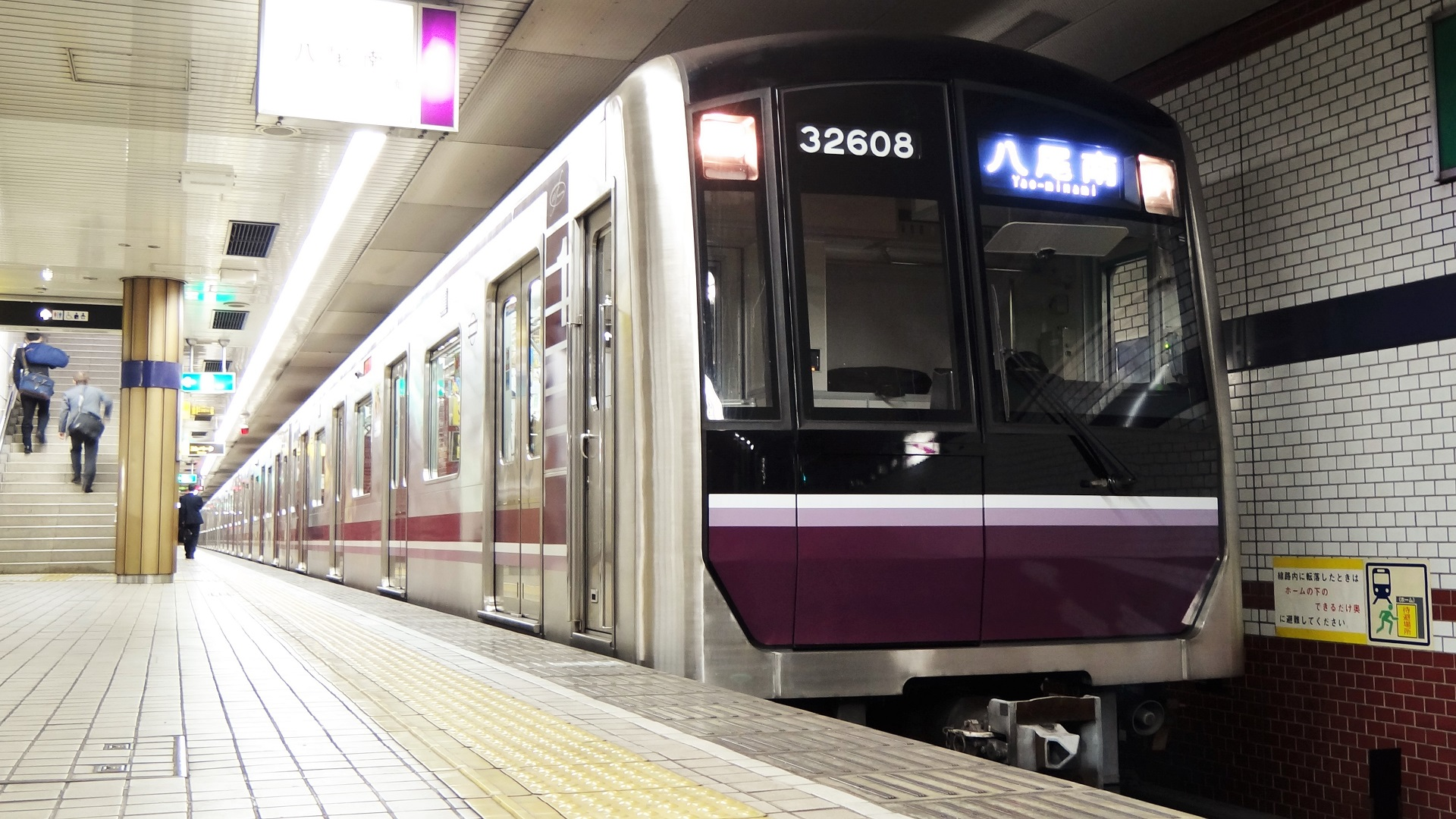 八尾南行きとして運転中の30000系